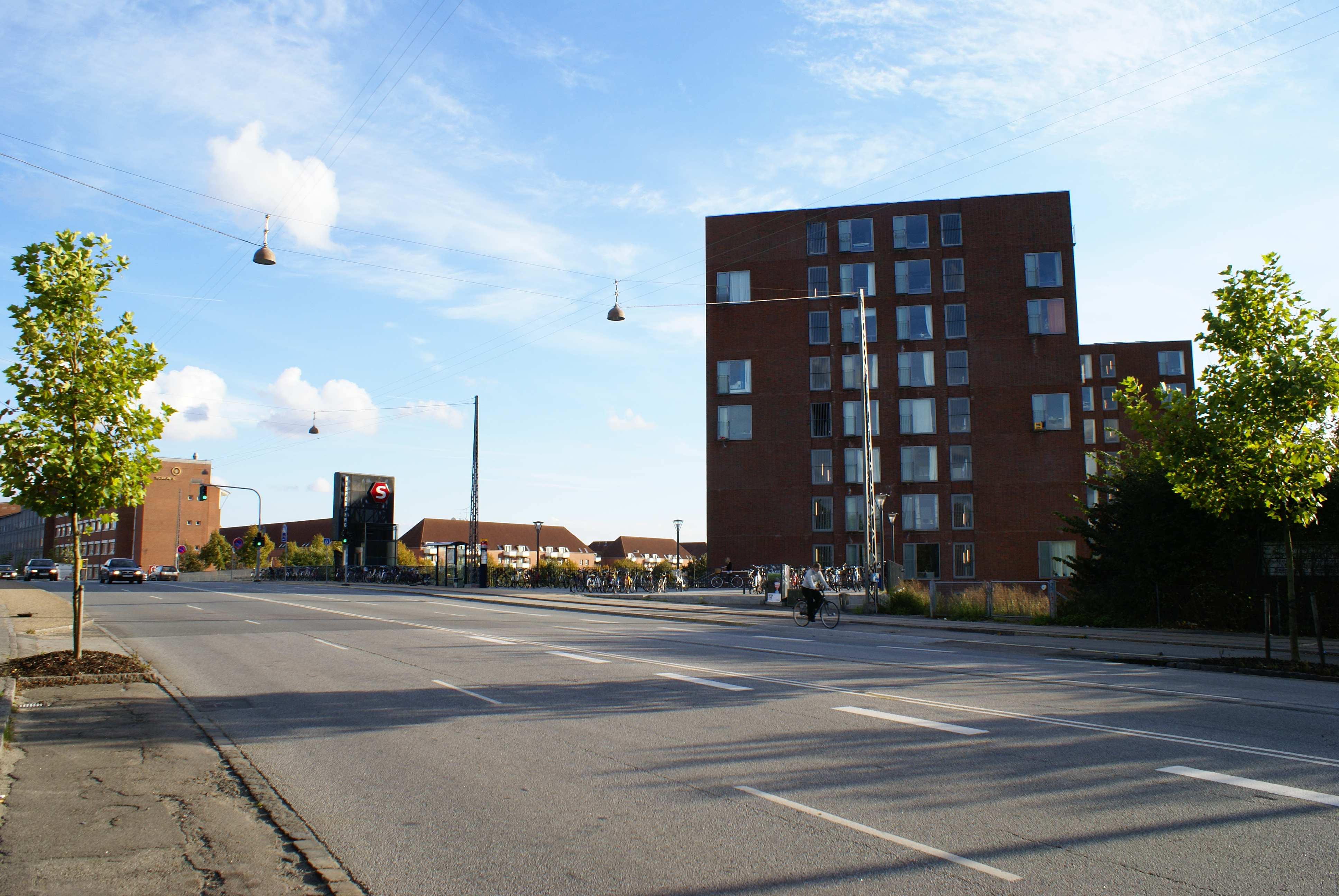 Keops Kollegiet (in Copenhagen), view from Tagensvej